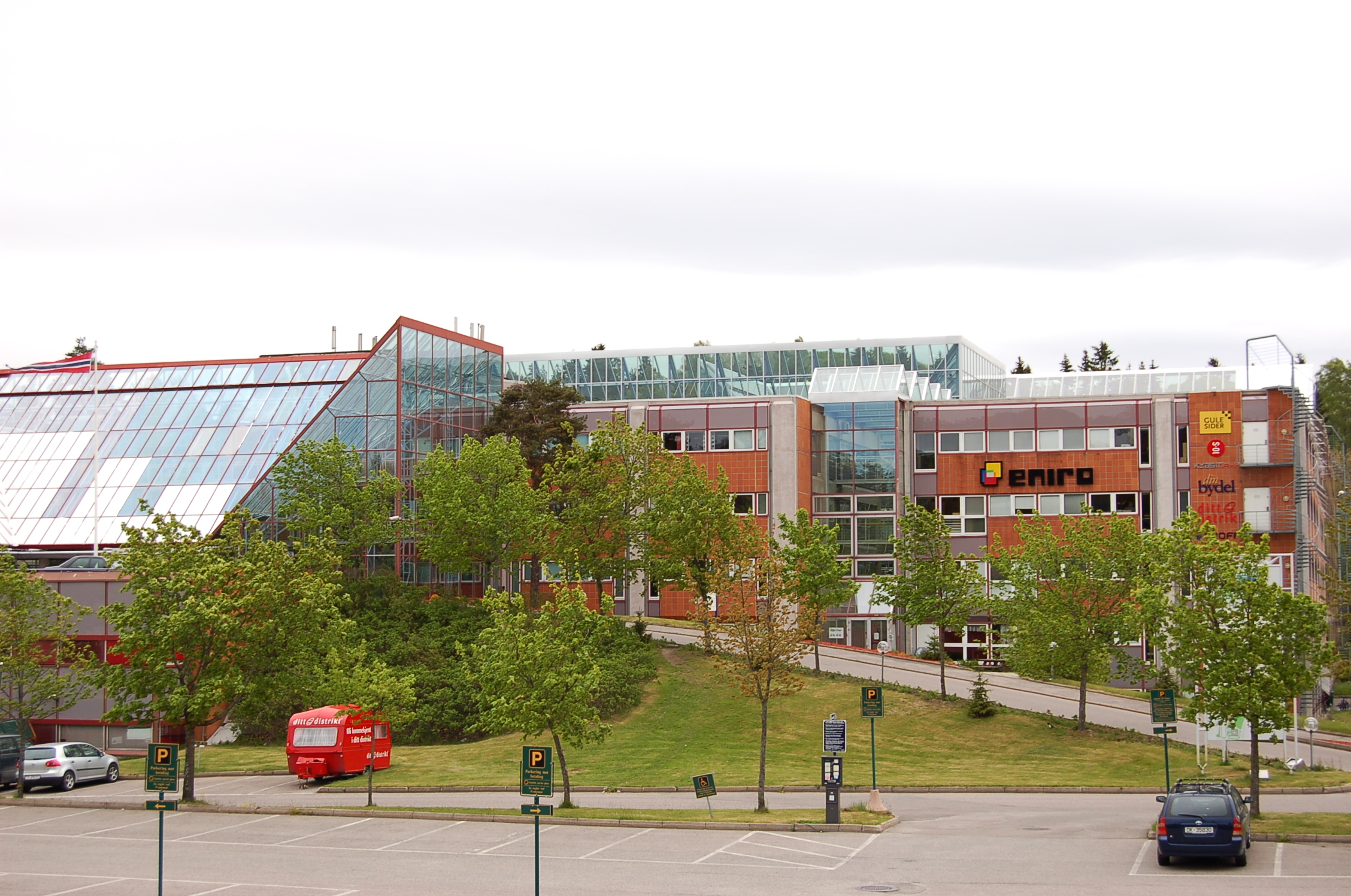 Det tidligere Tandberg-/Norsk Data-bygget i Olaf Helsets vei 5 på Skullerud. I dag holder bl.a. Eniro Norge til i bygget. Oppført i 1974, arkitekter Ole Bue og Eiler Prytz.